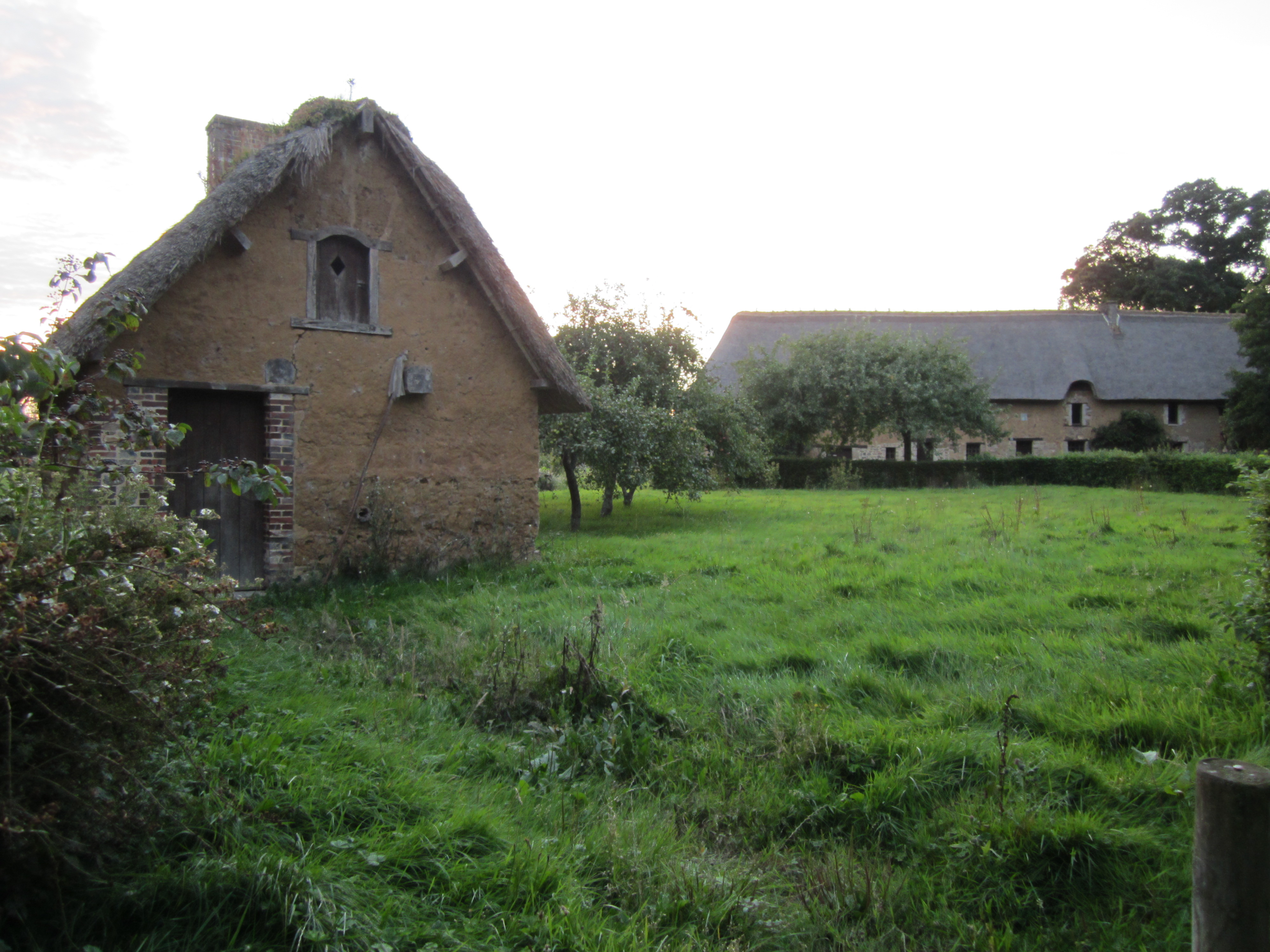 L'écomusée de la maison des Marais, Marchésieux .